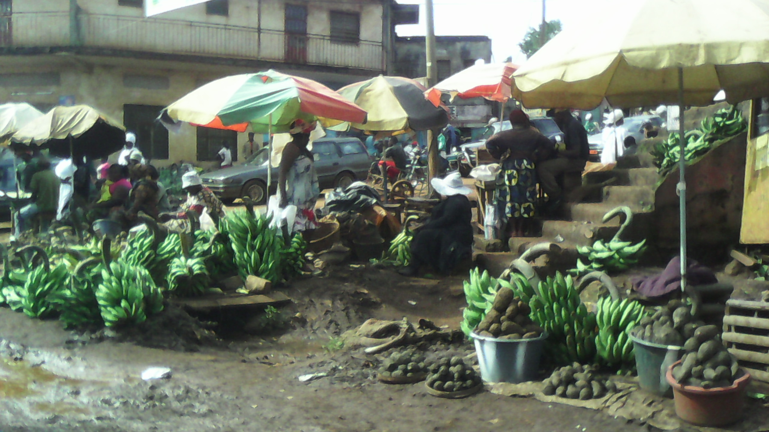 Images from Wiki Loves Africa 2014